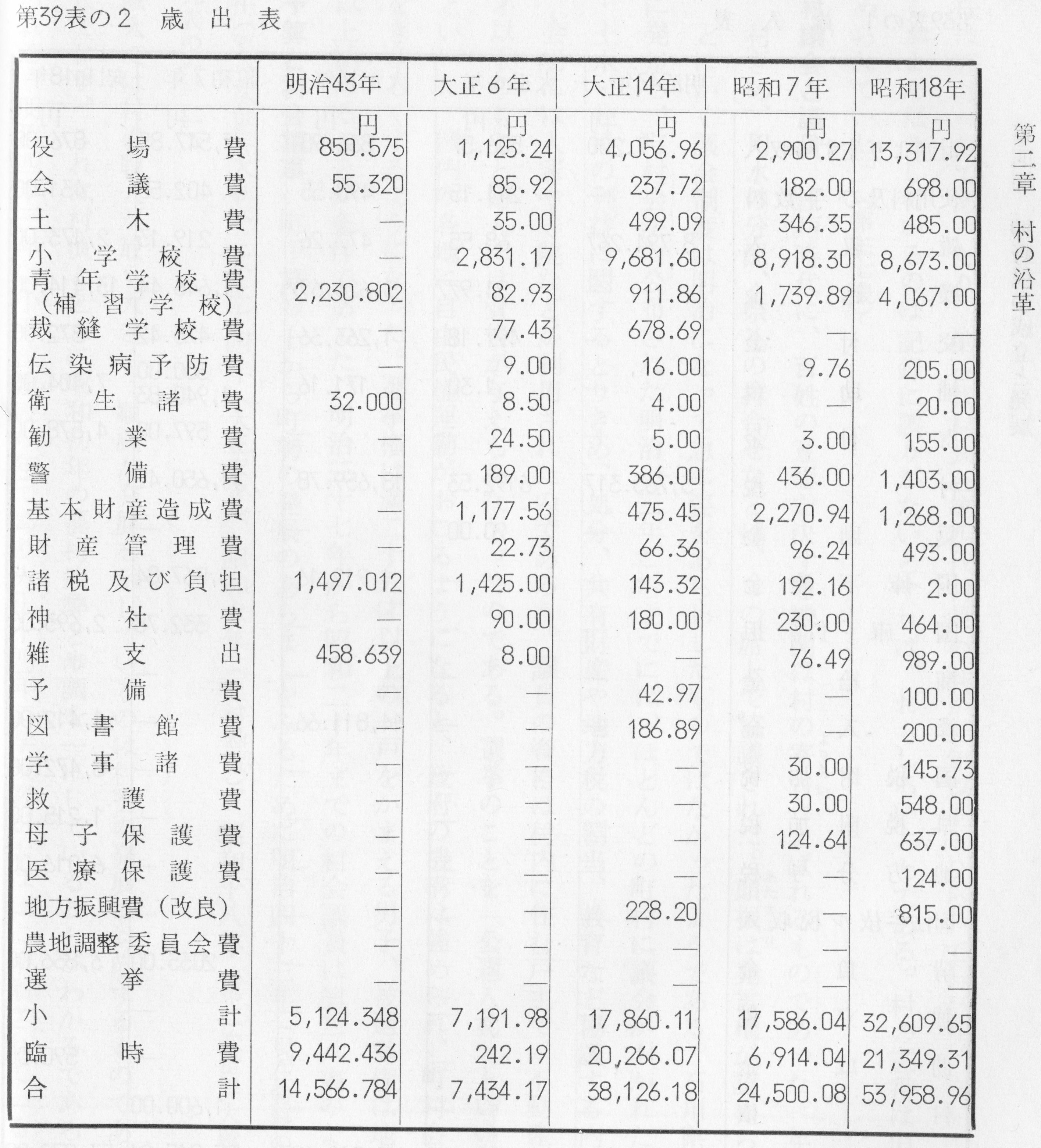 明治43年～昭和18年の押野村の支出一覧表